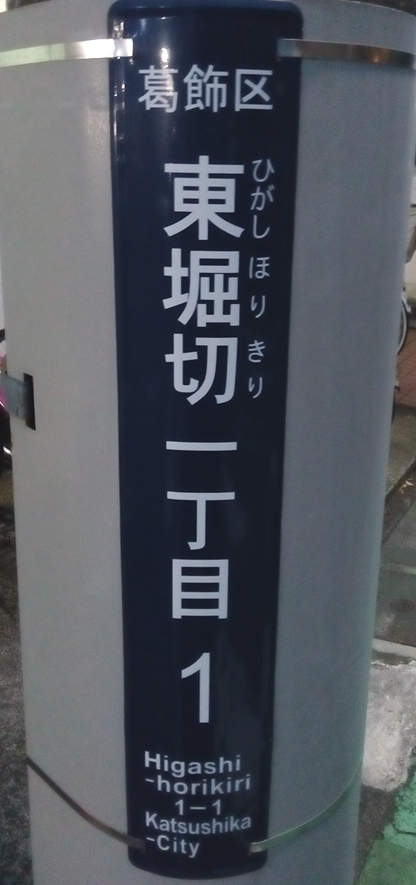 東堀切1丁目1番地